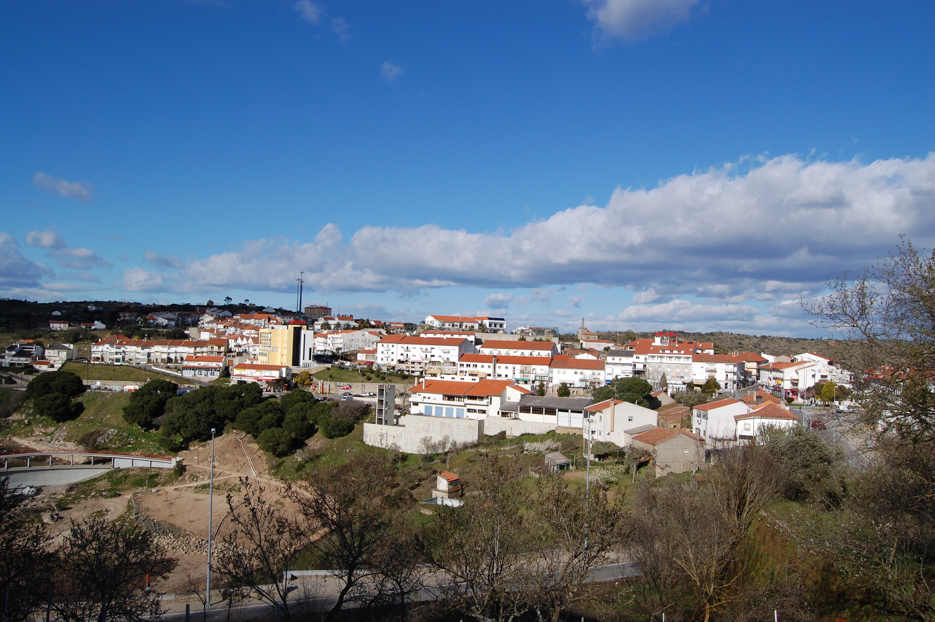 Miranda do Douro, Portugal.